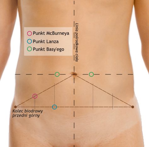 Na sylwetce ciała męskiego zaznaczono 3 punkty orientacyjne: Punkt McBurneya, Lanza i Basy'ego.